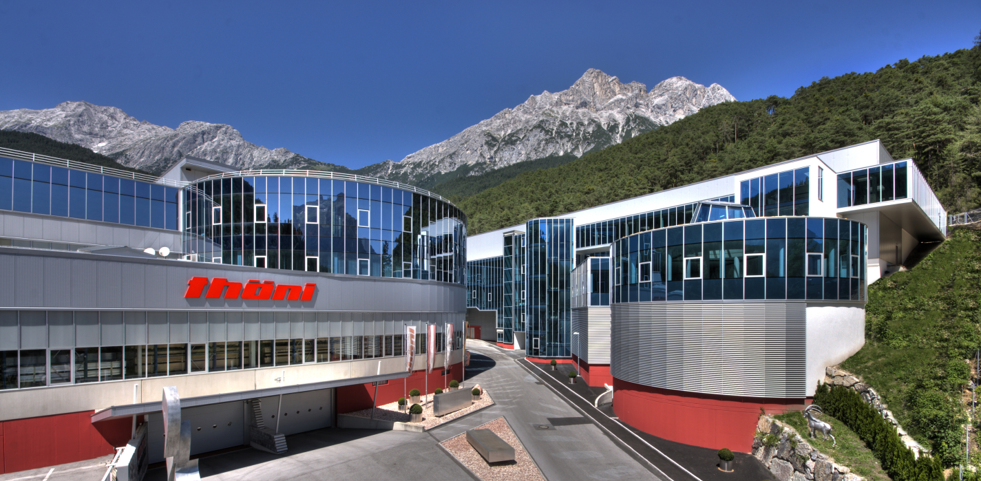 Thöni Company